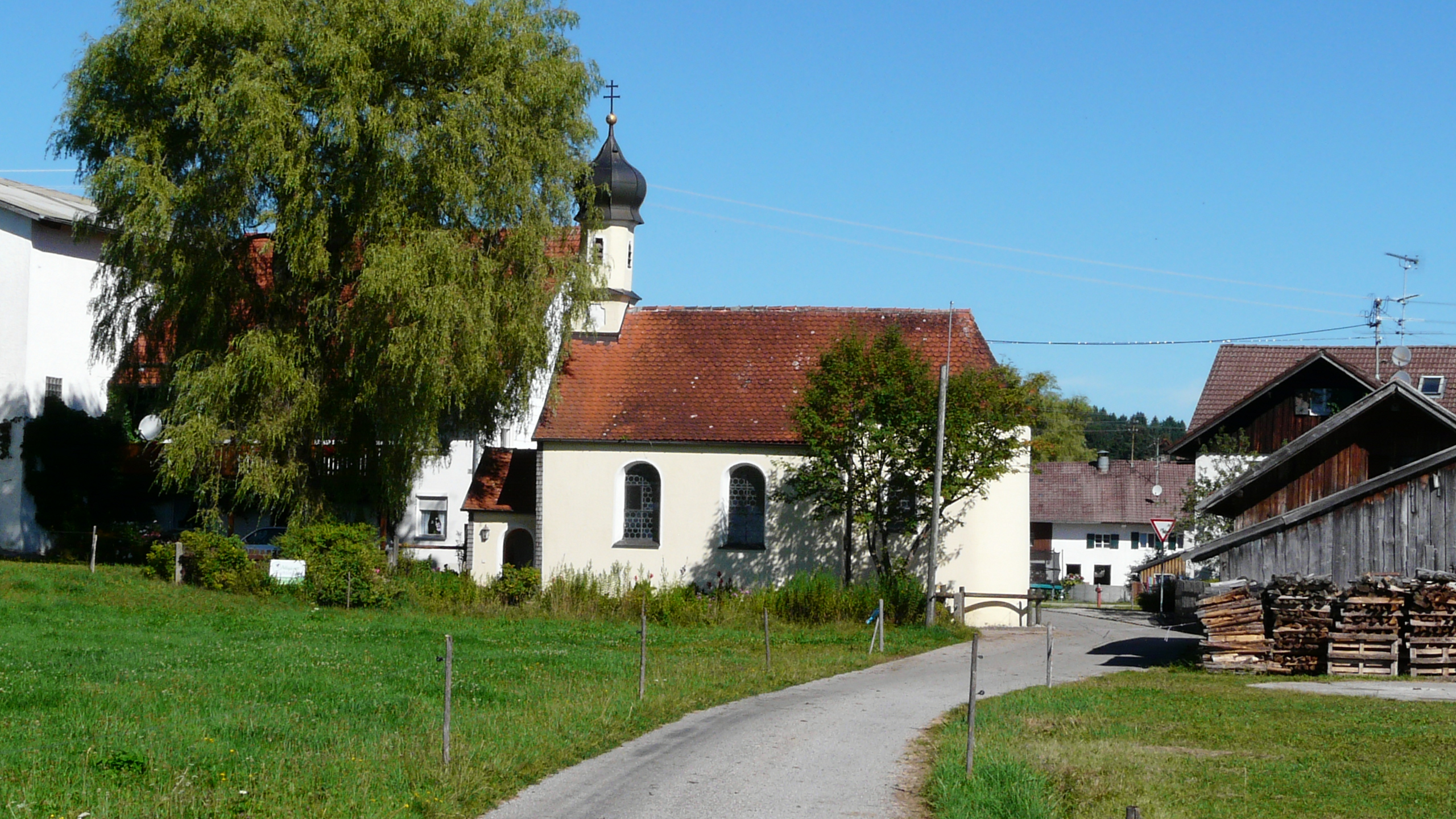 Kapelle in Salenwang, Friesenried